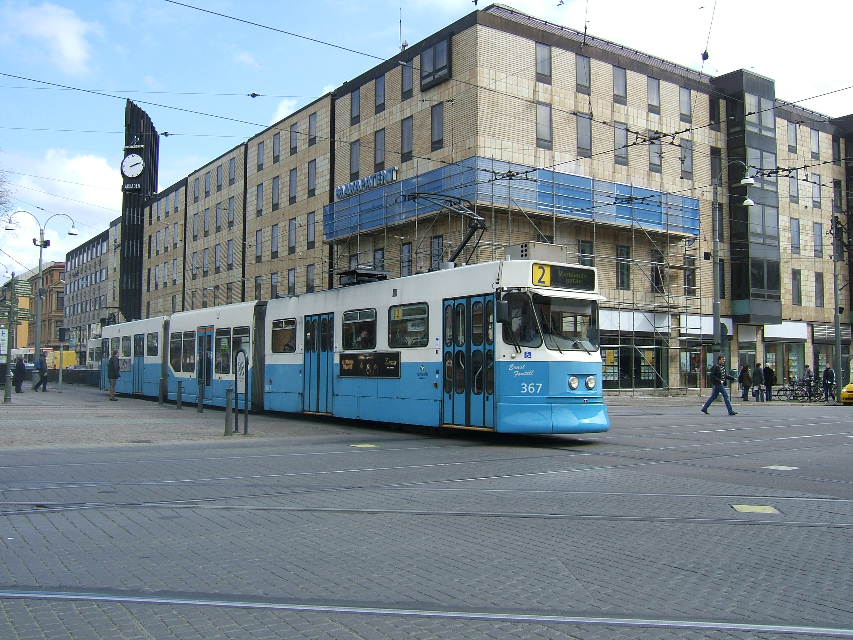 Tram in Göteborg, Sweden